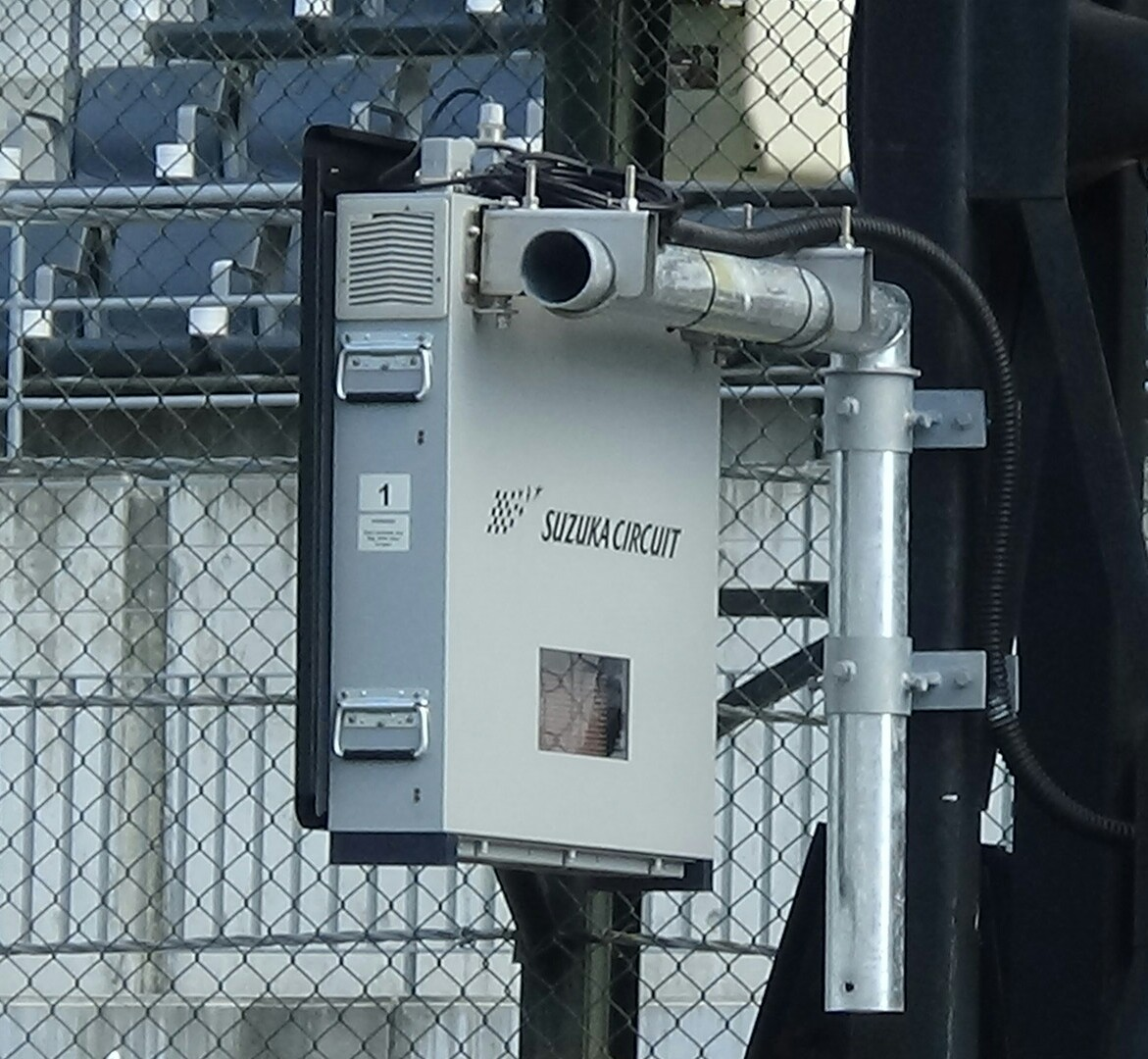 鈴鹿サーキット ホームストレートのライトパネル（裏側）